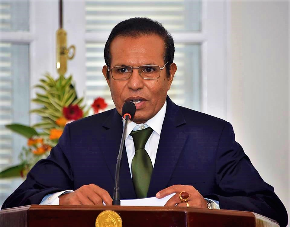 Premierminister Taur Matan Ruak